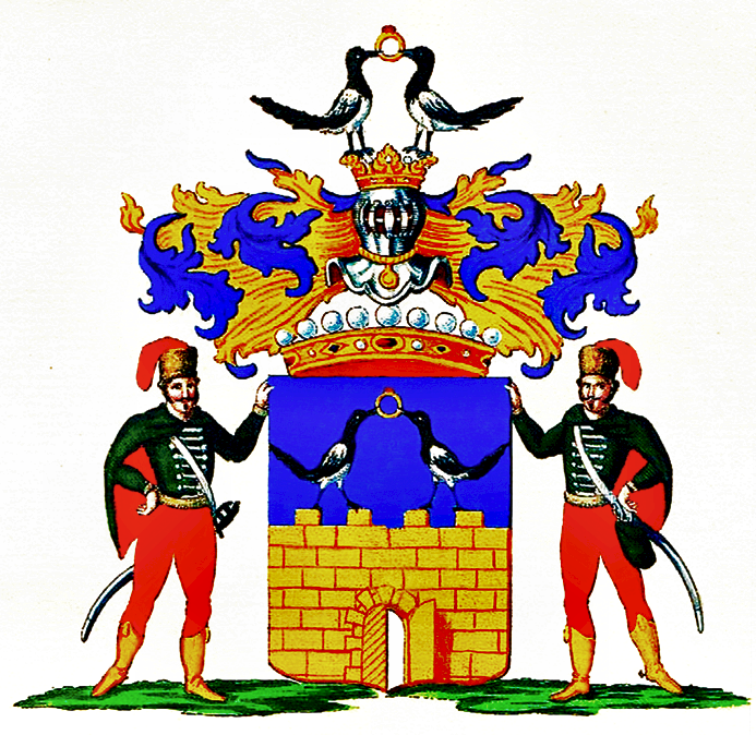 Wappen der Grafen Sztáray von Nagy-Mihaly 1747 nach Tyroff